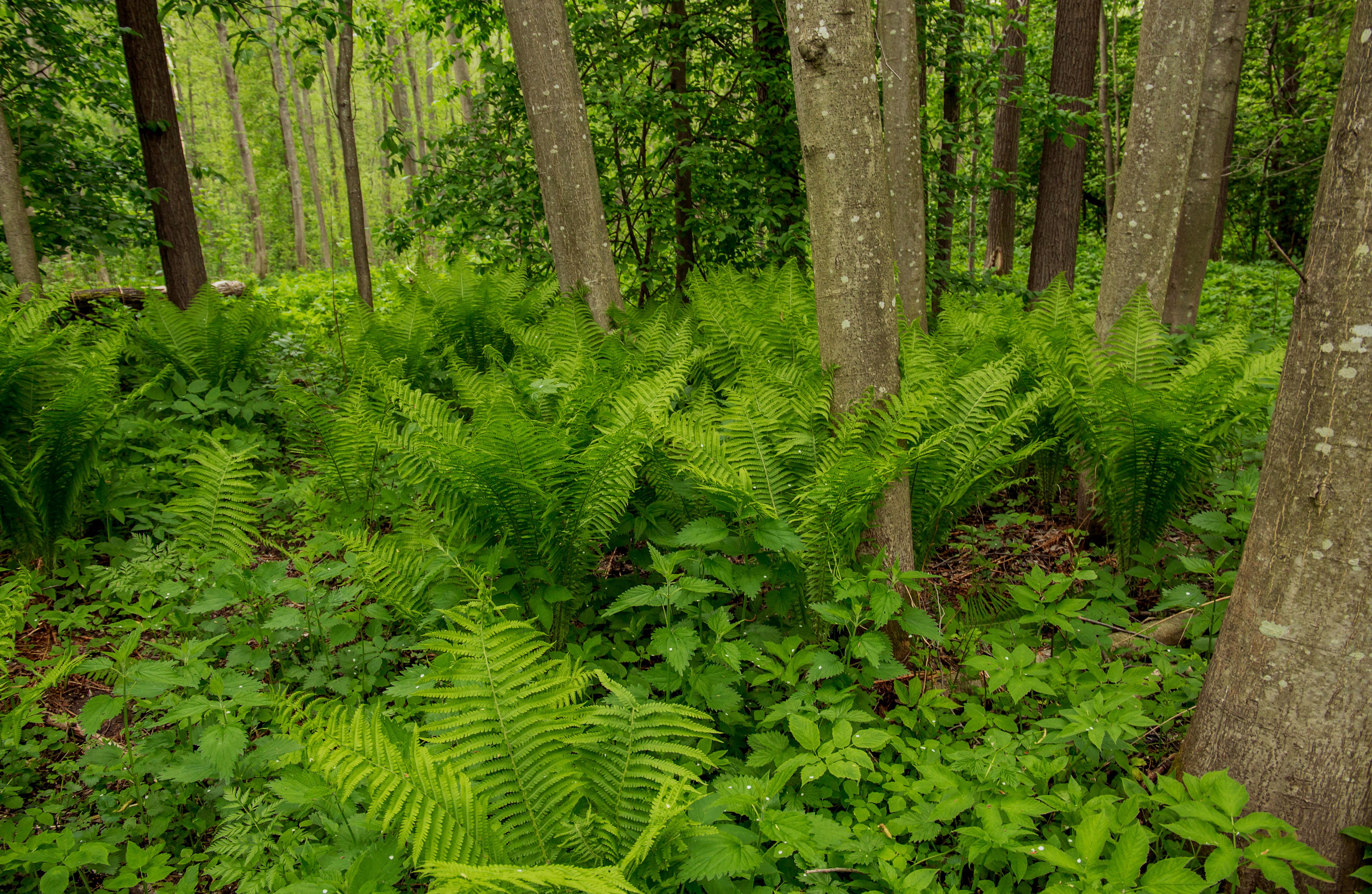 Волжско-Камский заповедник: Зеленодольский район, Татарстан This image is related to the protected area of Russia number 1600082